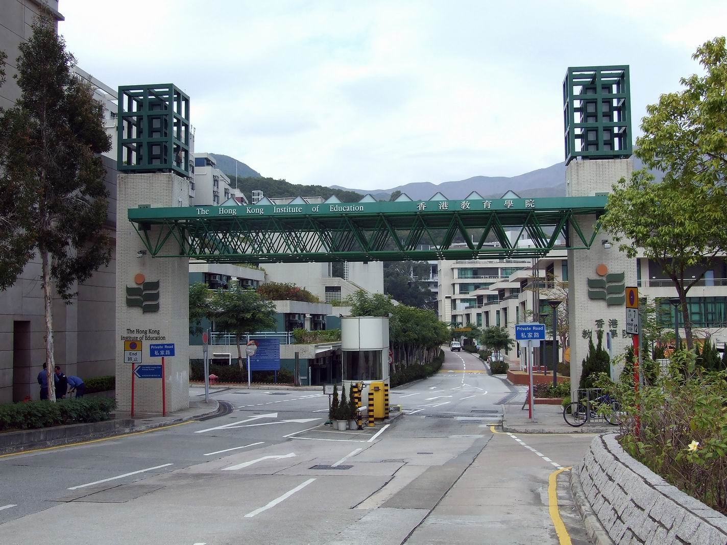 香港教育學院大埔校園入口